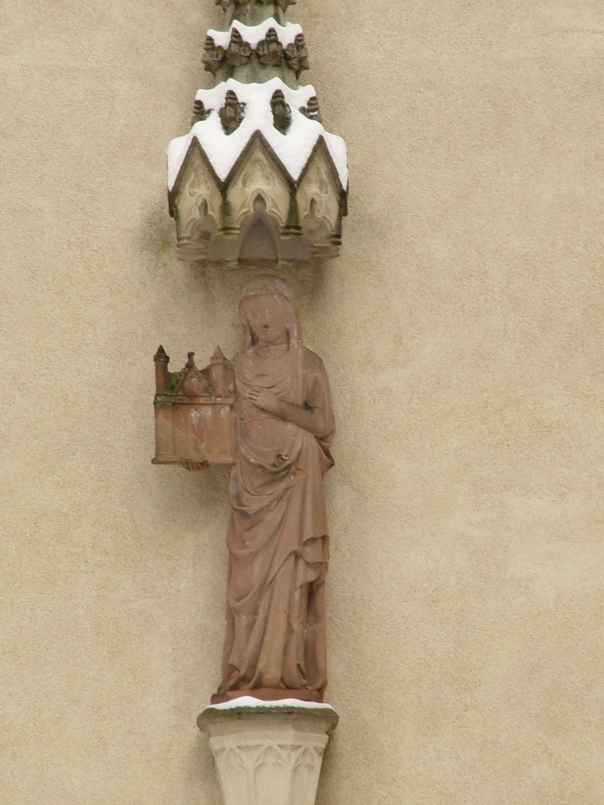 Statue von Uta von Schauenburg, der Stifterin vom Kloster Allerheiligen. Fotografiert in Lichtental über dem Portal der Fürstenkapelle im Kloster Lichtenthal.